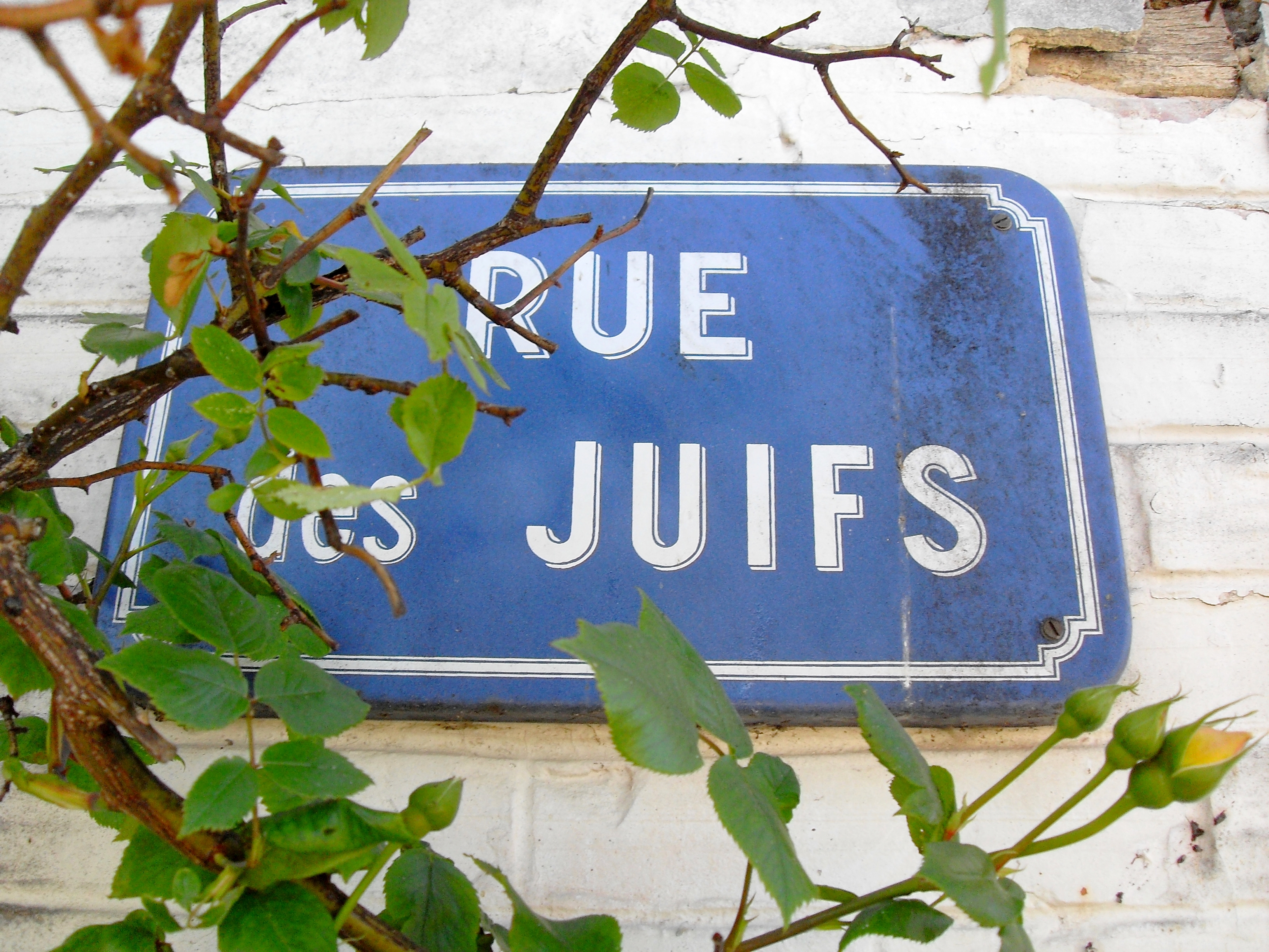 France, Nettancourt, Meuse (55) - Plaque de la Rue des Juifs